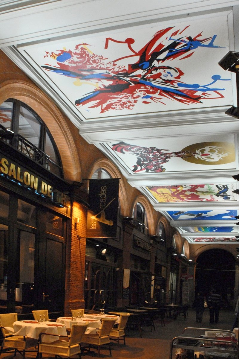 Les peintures de Raymond Moretti sous les arcadres du Capitole à Toulouse